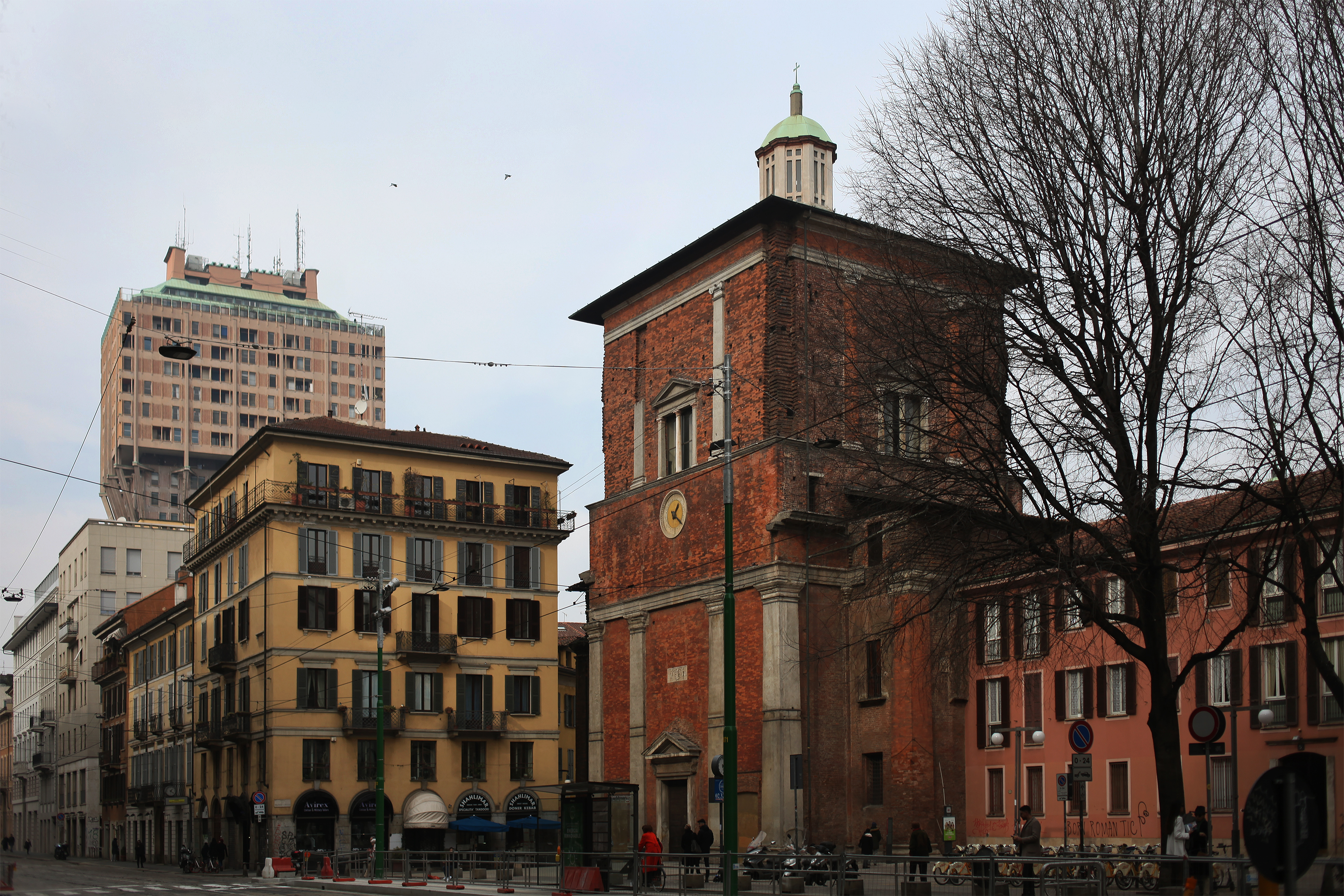 La Basilica di San Nazaro in Brolo, Milano, veduta del complesso con la Torre Velasca sullo sfondo